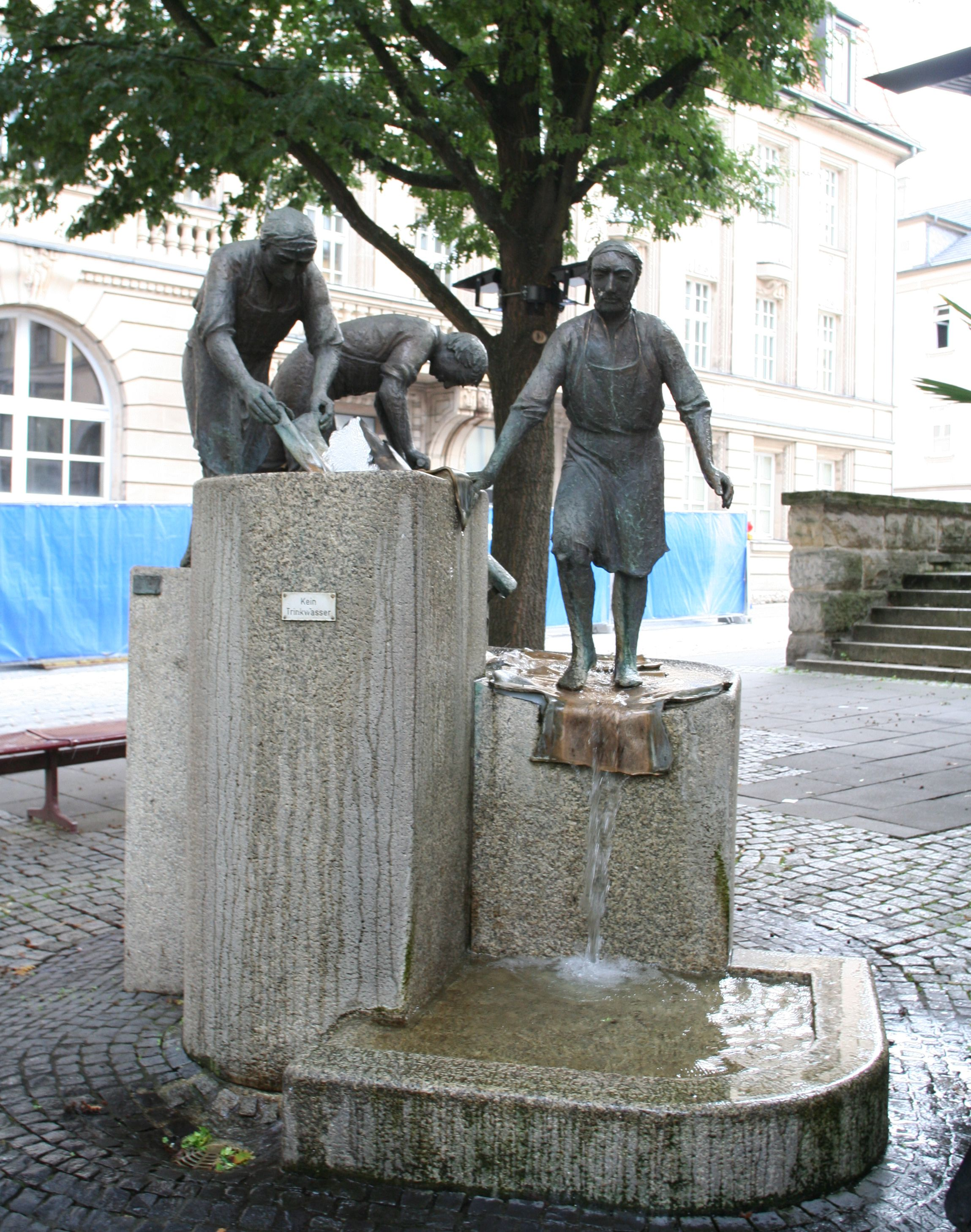 Gerberbrunnen vor dem Gräfsbock in Coburg